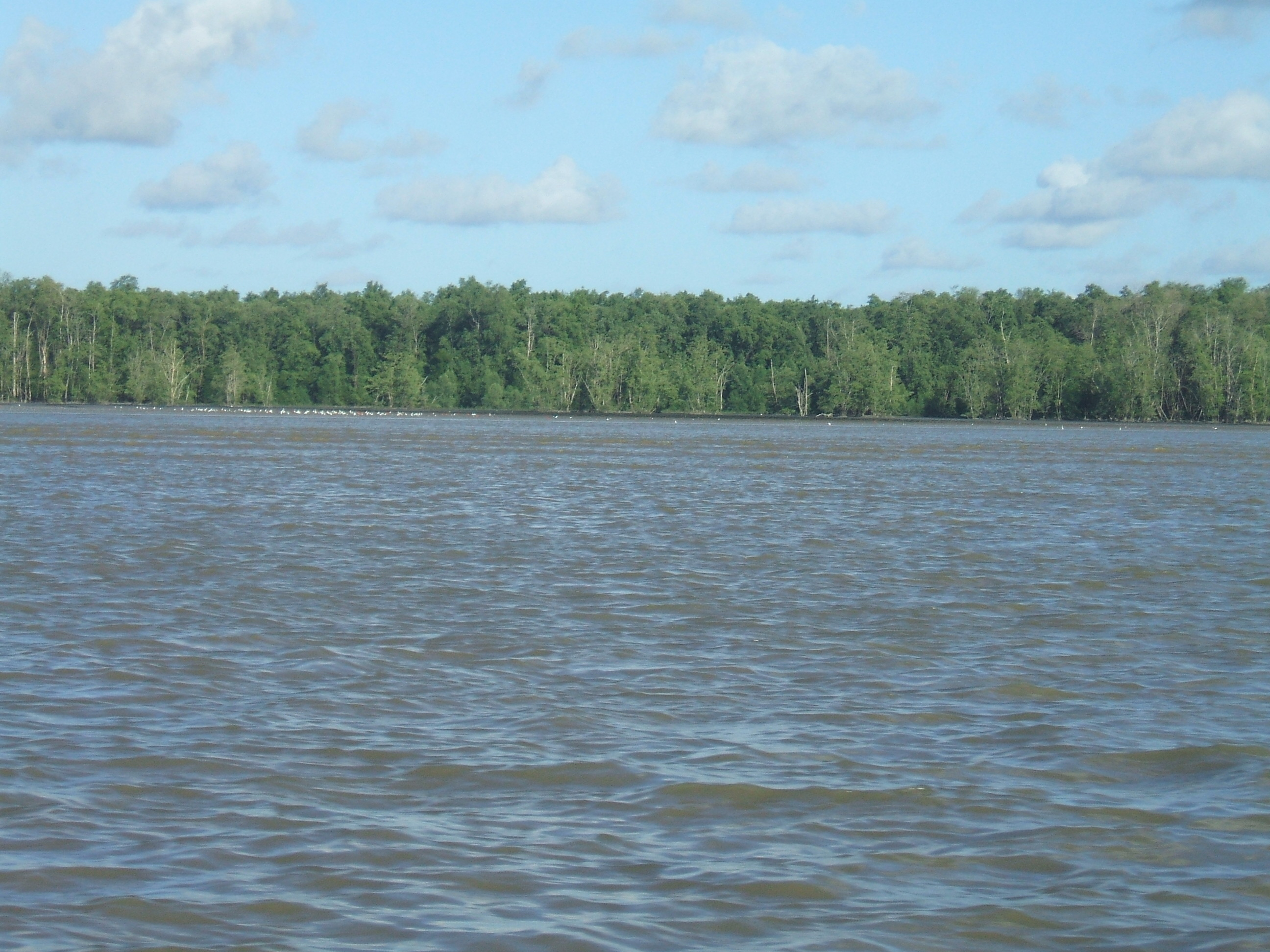 manguezal de siriúba - Avicennia schaueriana, com revoada de pássaros